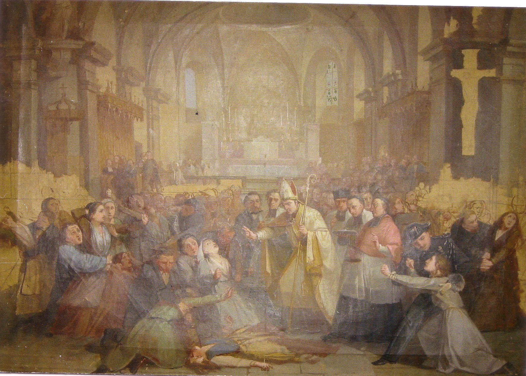 Tableau représentant la cérémonie de confirmation de 1864 à Morzine. L'évêque d'Annecy est molesté par les femmes de la commune se disant "possédées par des diables".